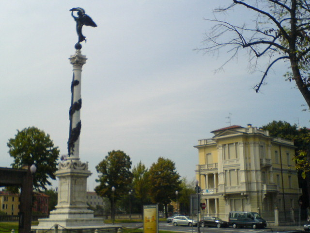 Monumento alla Vittoria a Parma, Emilia Romagna, opera di Ettore Ximenes.